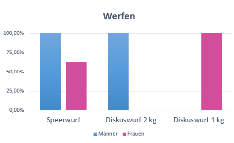 100% beschreibt jeweils die Weite des männlichen Rekordes.